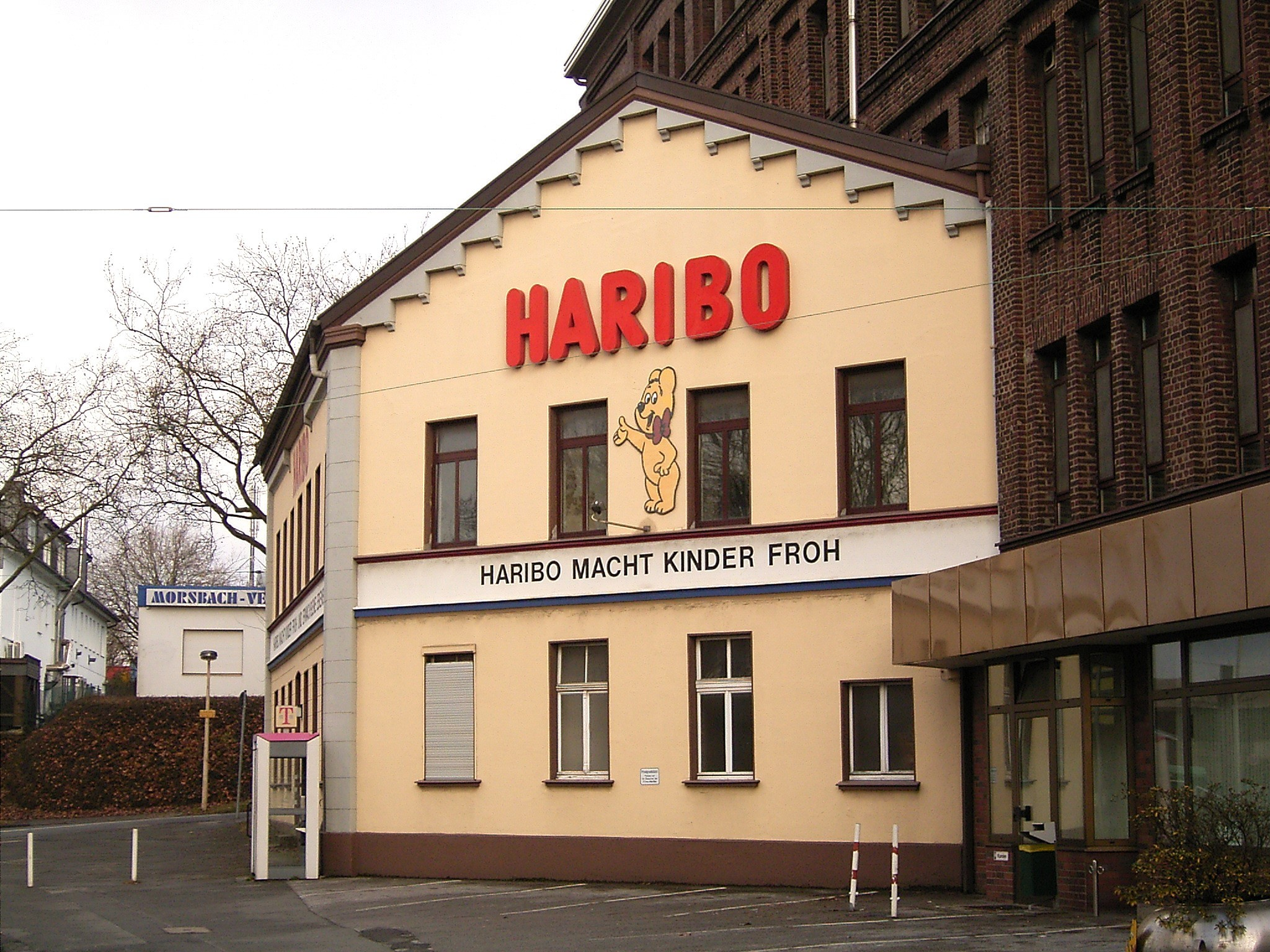 Vorderseite des Haribo-Werkes in Solingen. Dieser Gebäudeteil wurde 2009 abgerissen.